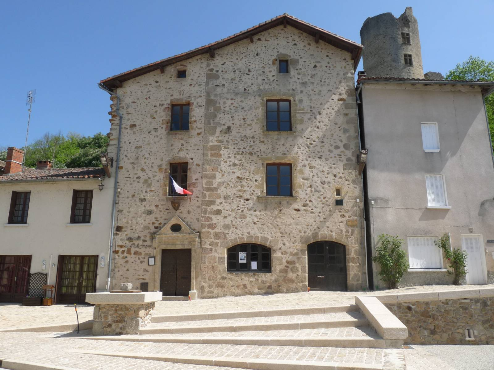 Mairie de St-Germain-de-Confolens, Charente, France